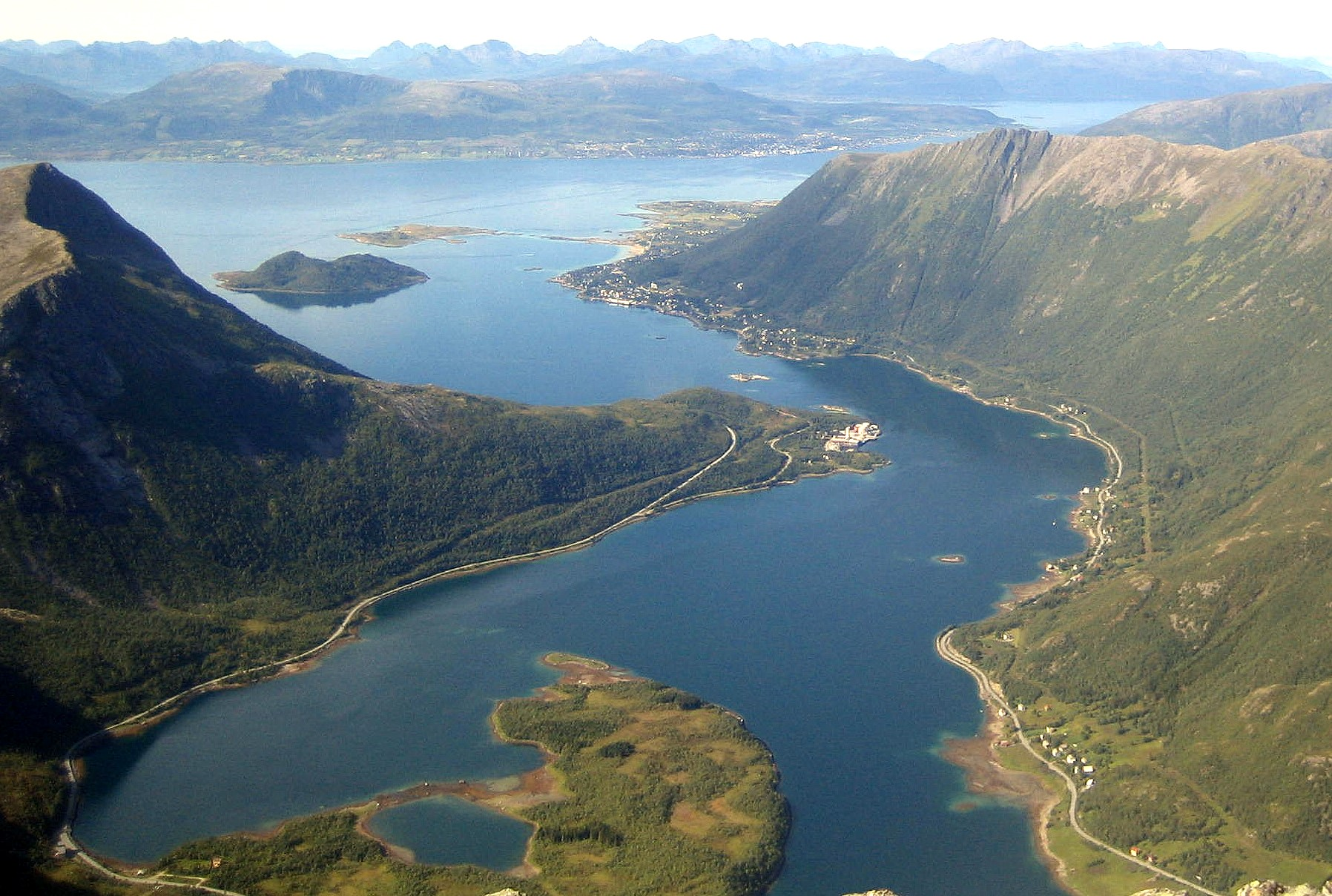 Sigerfjord i Vesterålen